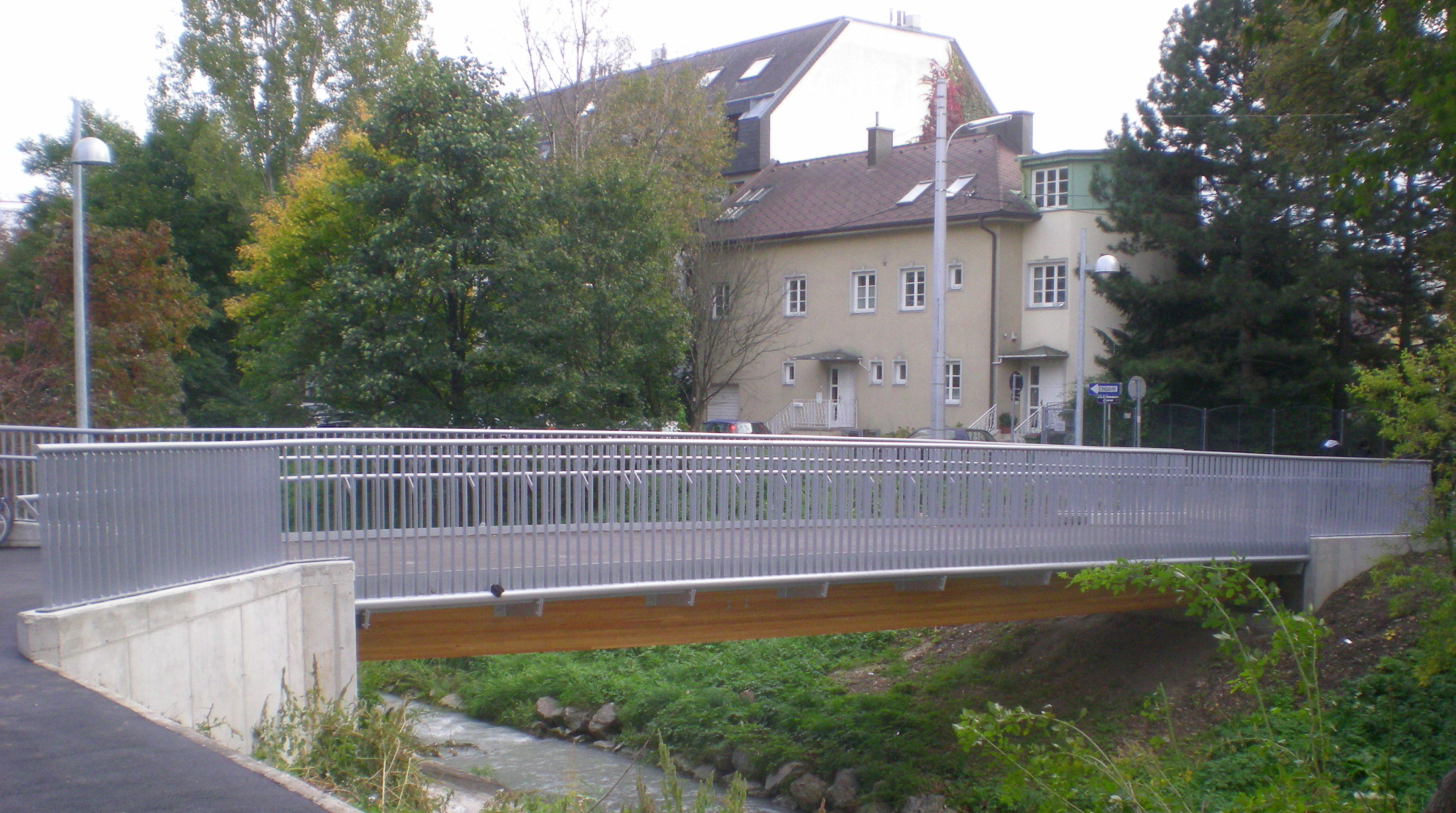 Der 2010 errichtete Steg Fabergasse in Wien-Liesing